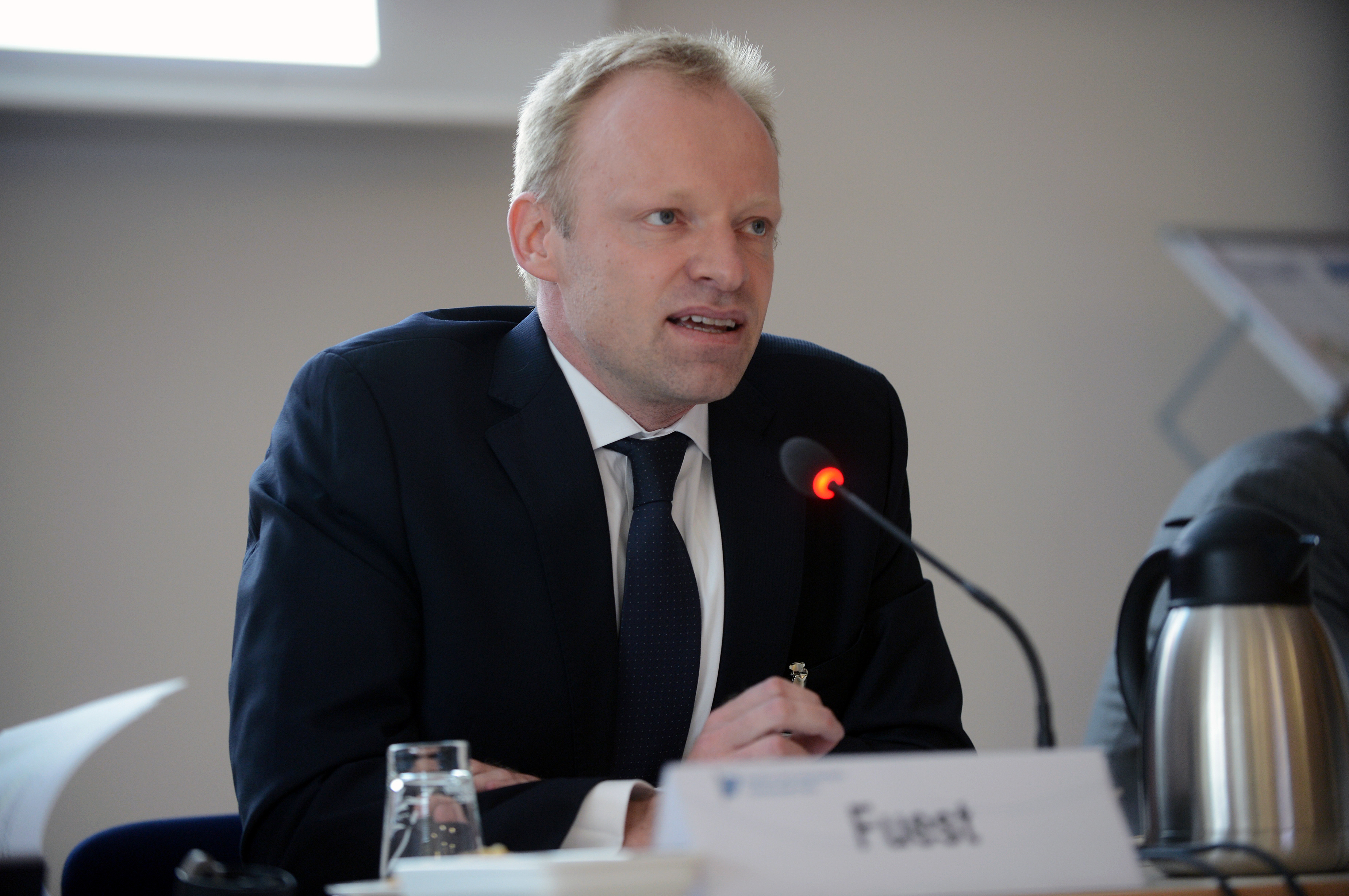 Clemens Fuest bei der Wissenschaftlichen Round-Table-Jahrestagung 2012